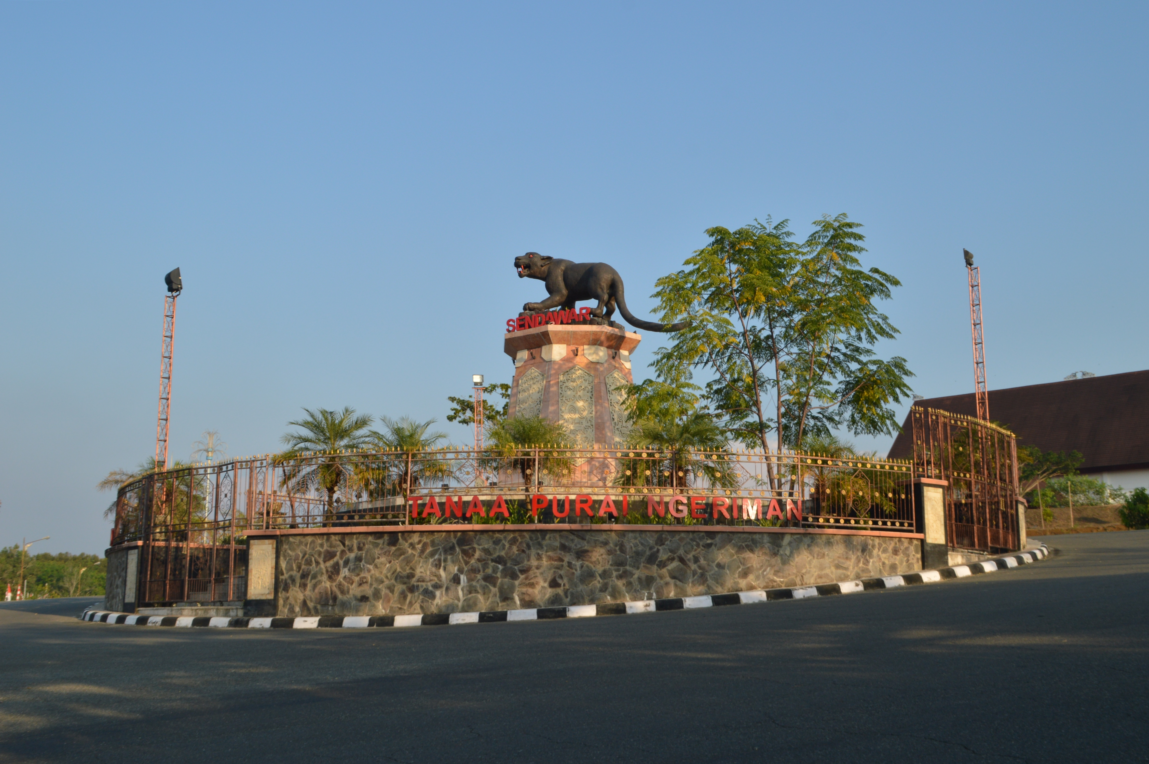 Tugu Macan Dahan di bundaran kompleks perkantoran Kabupaten Kutai Barat di Sendawar.